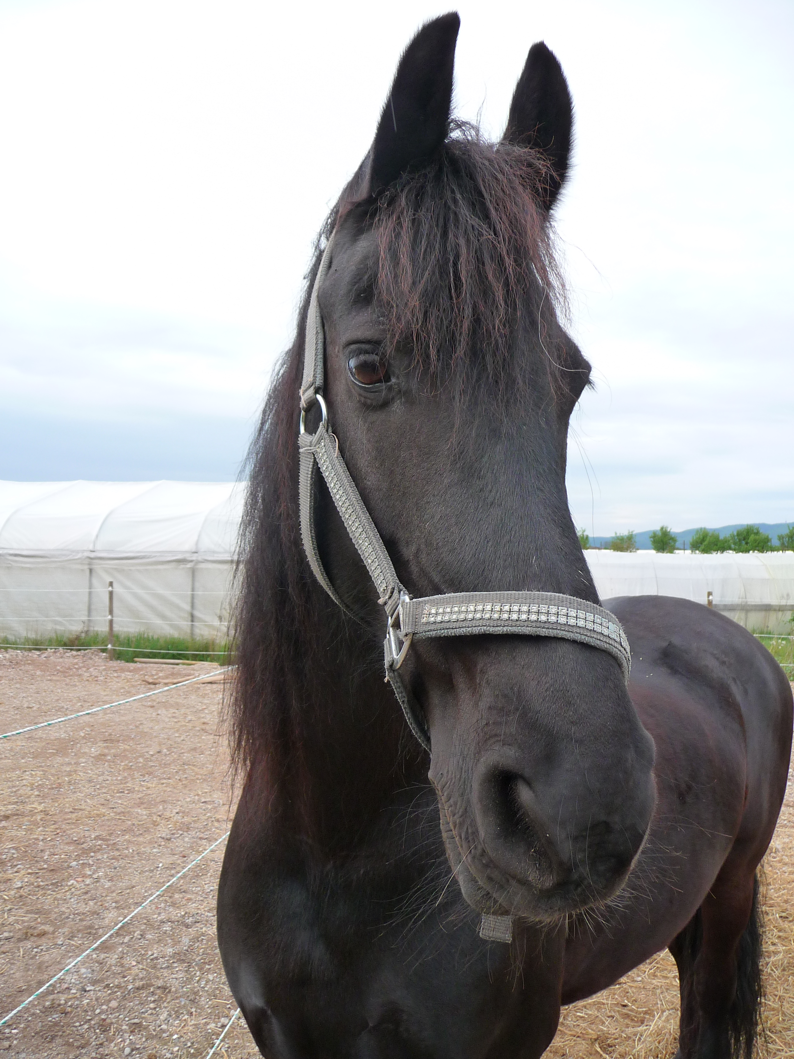 Kopf eines Friesen, fotografiert in Heidelberg (Baden-Württemberg, Deutschland)